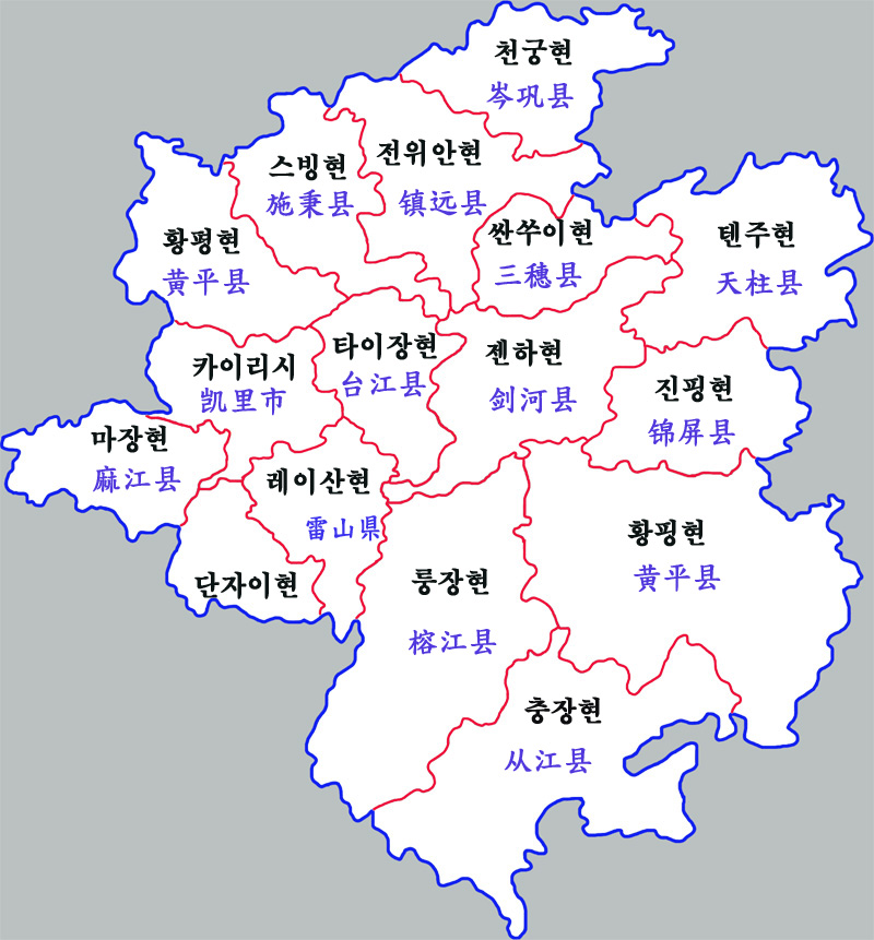 첸둥난자치주 현급구역도